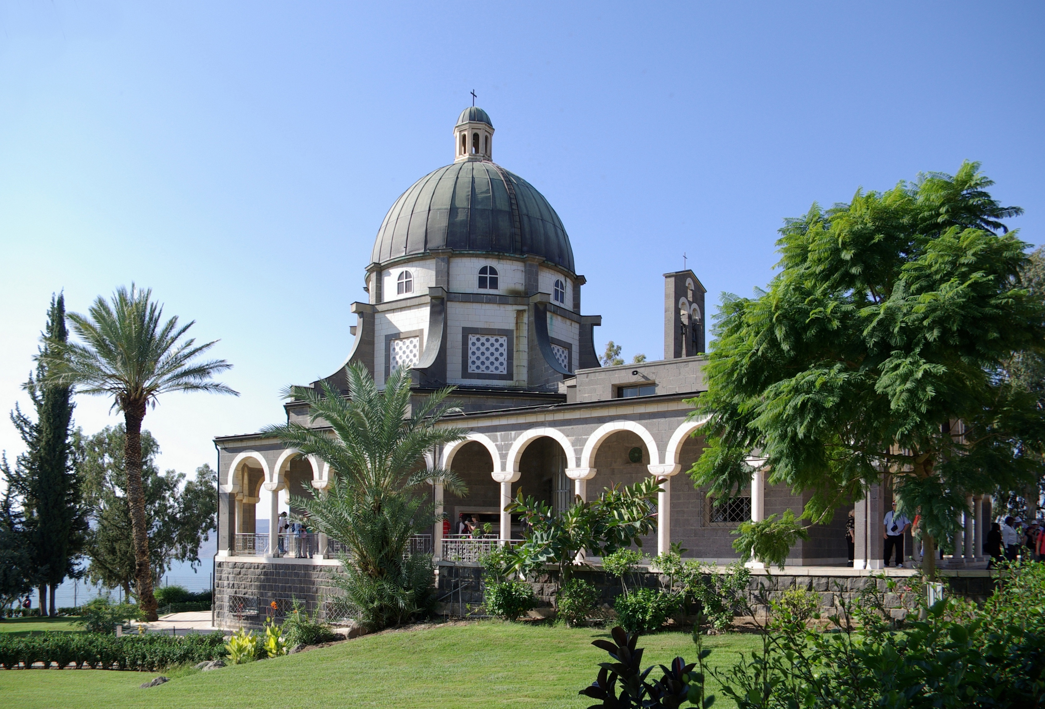 Kirche auf dem Berg der Seligpreisungen